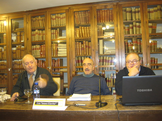 Antoni Pladevall, Armand de Fluvià i Esteve Canyameres al cicle de debats de la Institució Catalana de Genealogia i Heràldica. Tema: Genealogia com a cultura popular lligada a la terra, la casa, a l’ofici. Lloc: Ateneu Barcelonès.